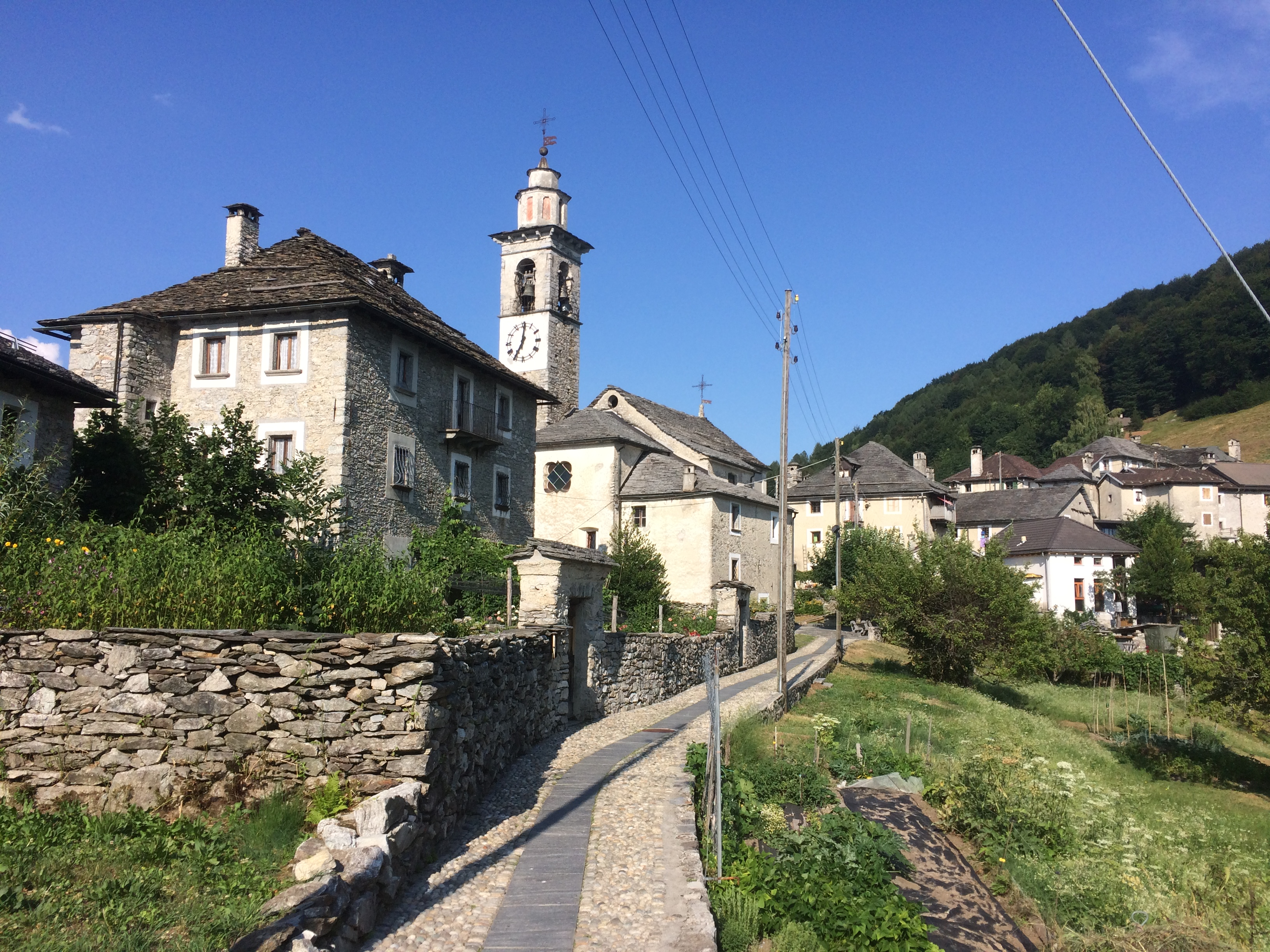 Rasa, Gemeinde Centovalli (Tessin)